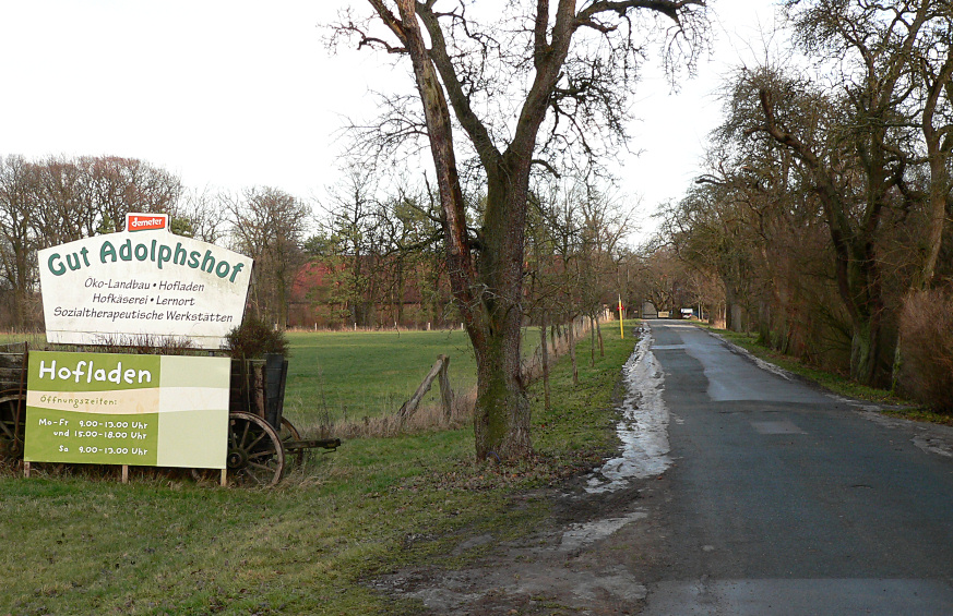 Zufahrt zum Adolphshof